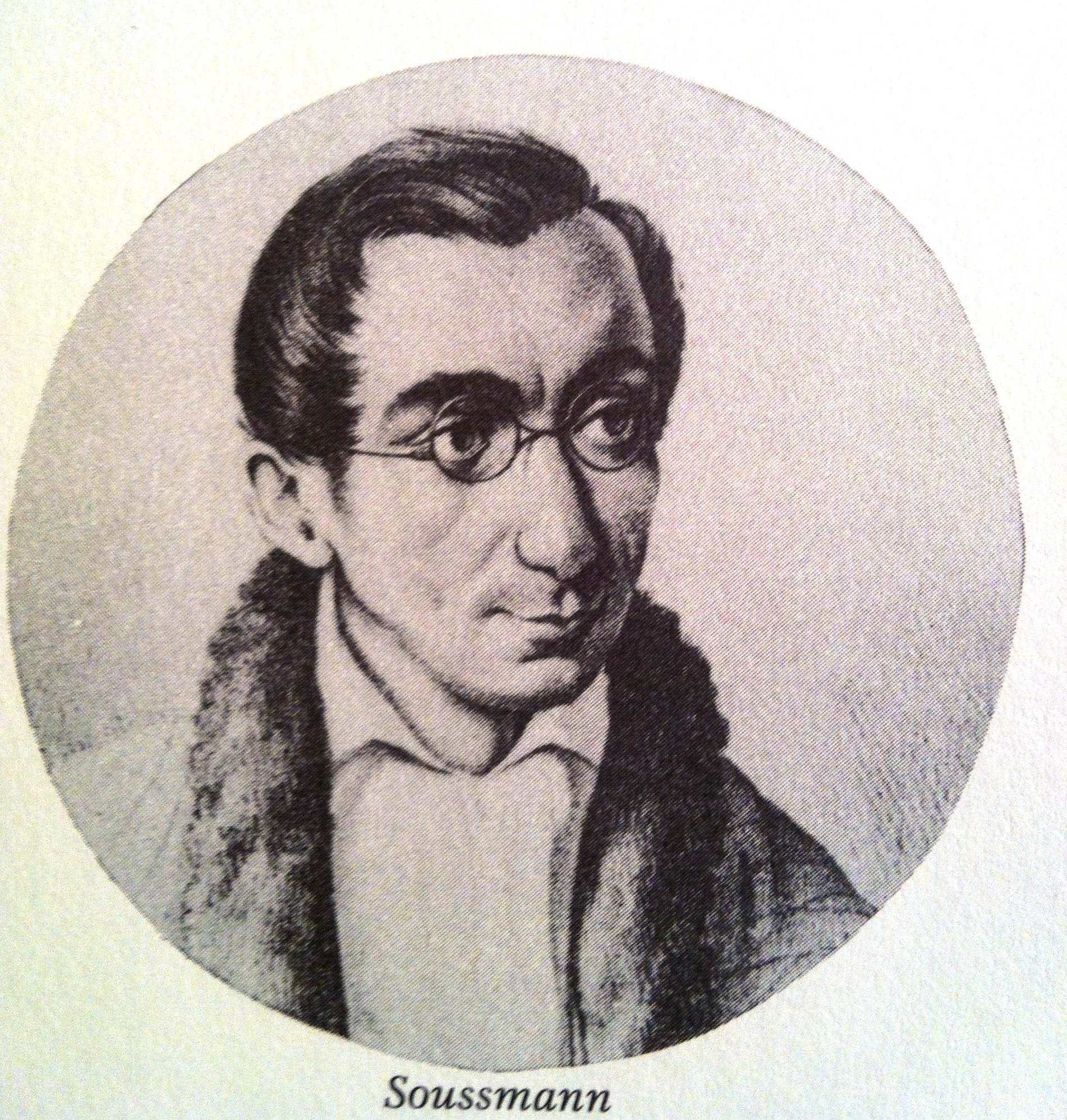 Ritratto del flautista Heinrich Soussmann (1796-1848)